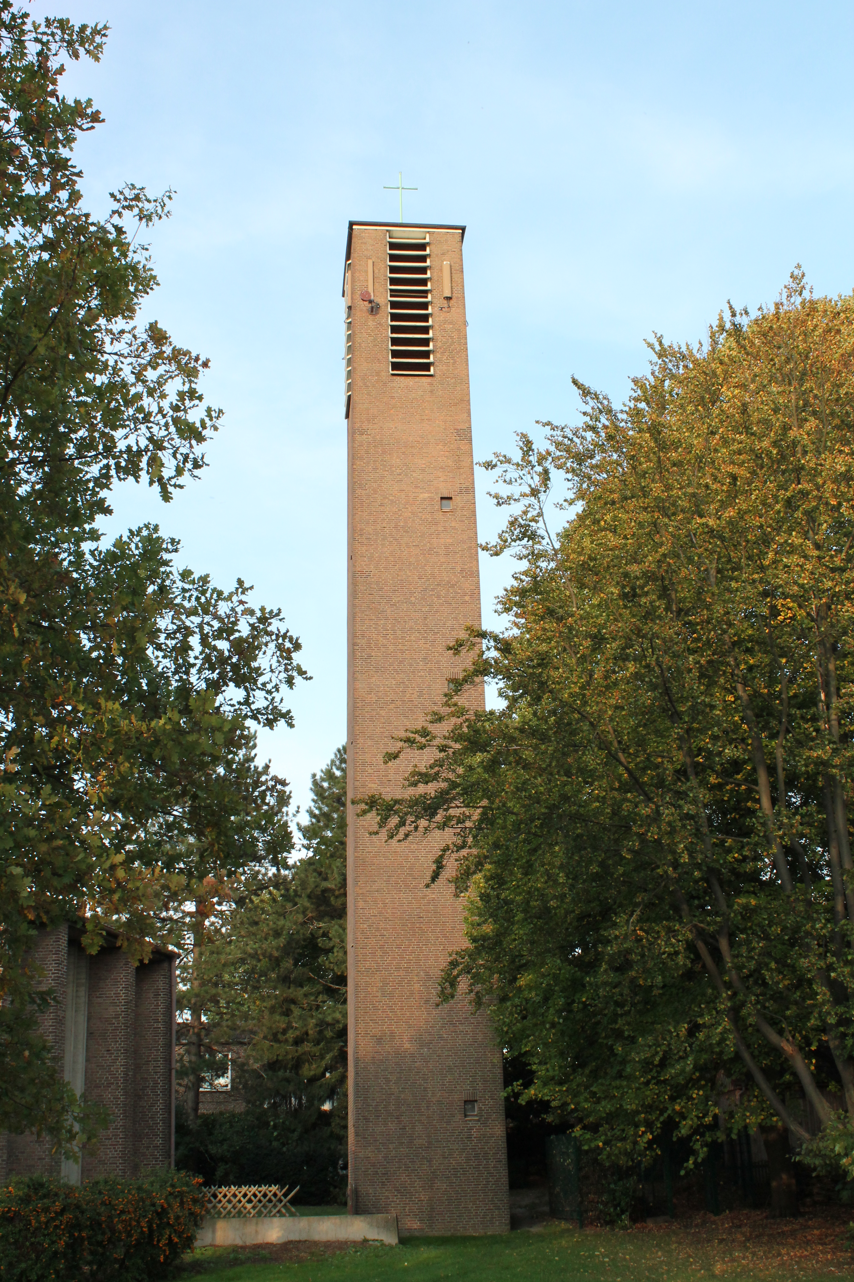 Herford, Baudenkmal 478, Turm